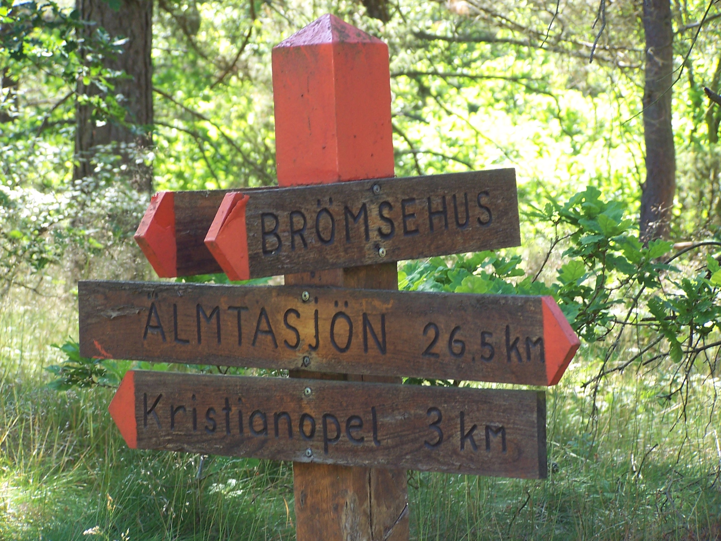 Skylt på Blekingeleden nära Brömsehus 3 km från Kristianopel